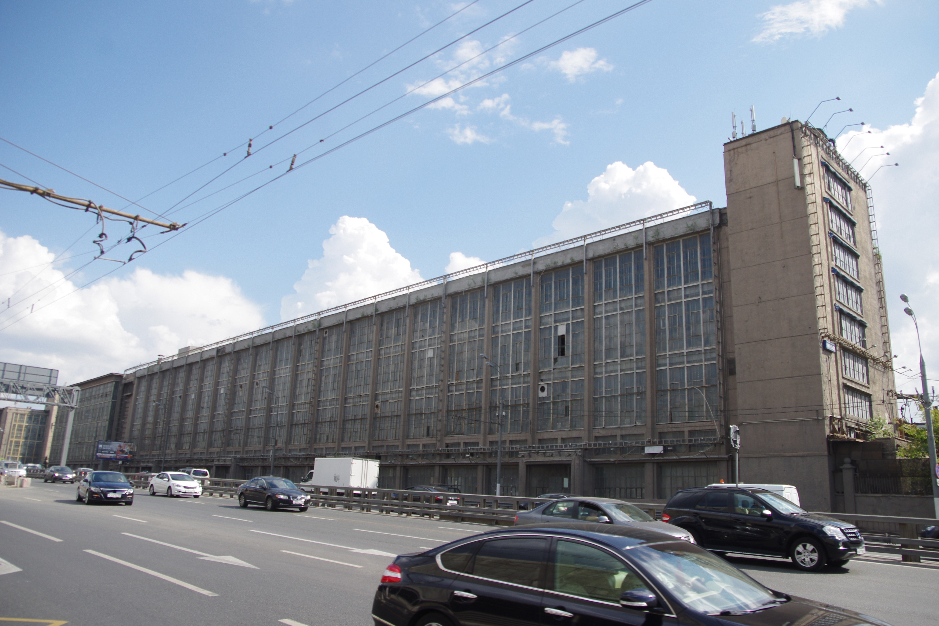 Экскурсия на ЗИЛ